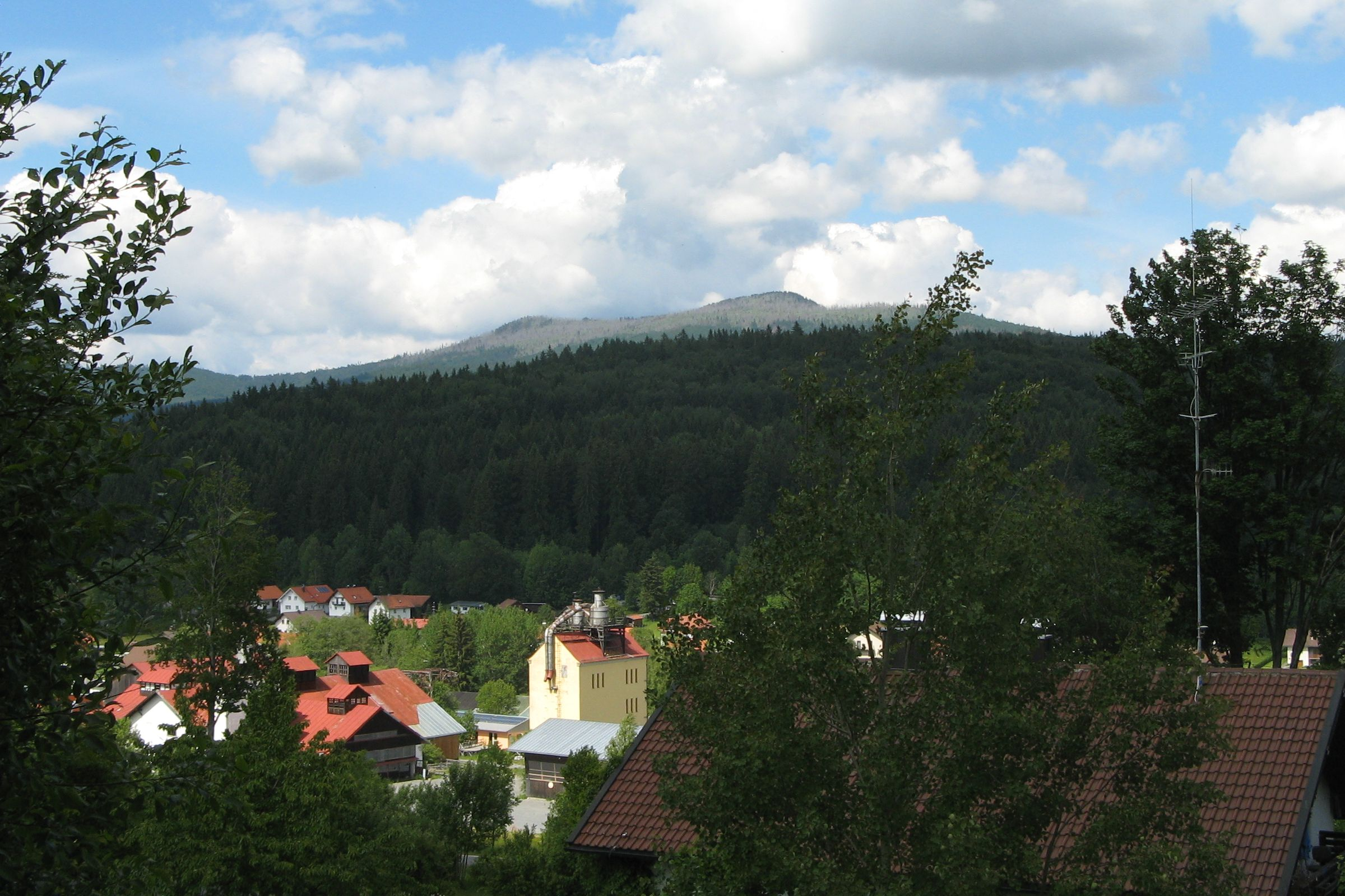 Der Kleine Rachel (links 1399 m) und der Große Rachel (rechts 1453 m) von Spiegelau aus gesehen